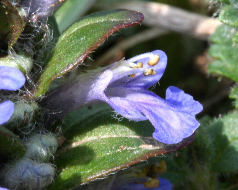 Ajuga reptans